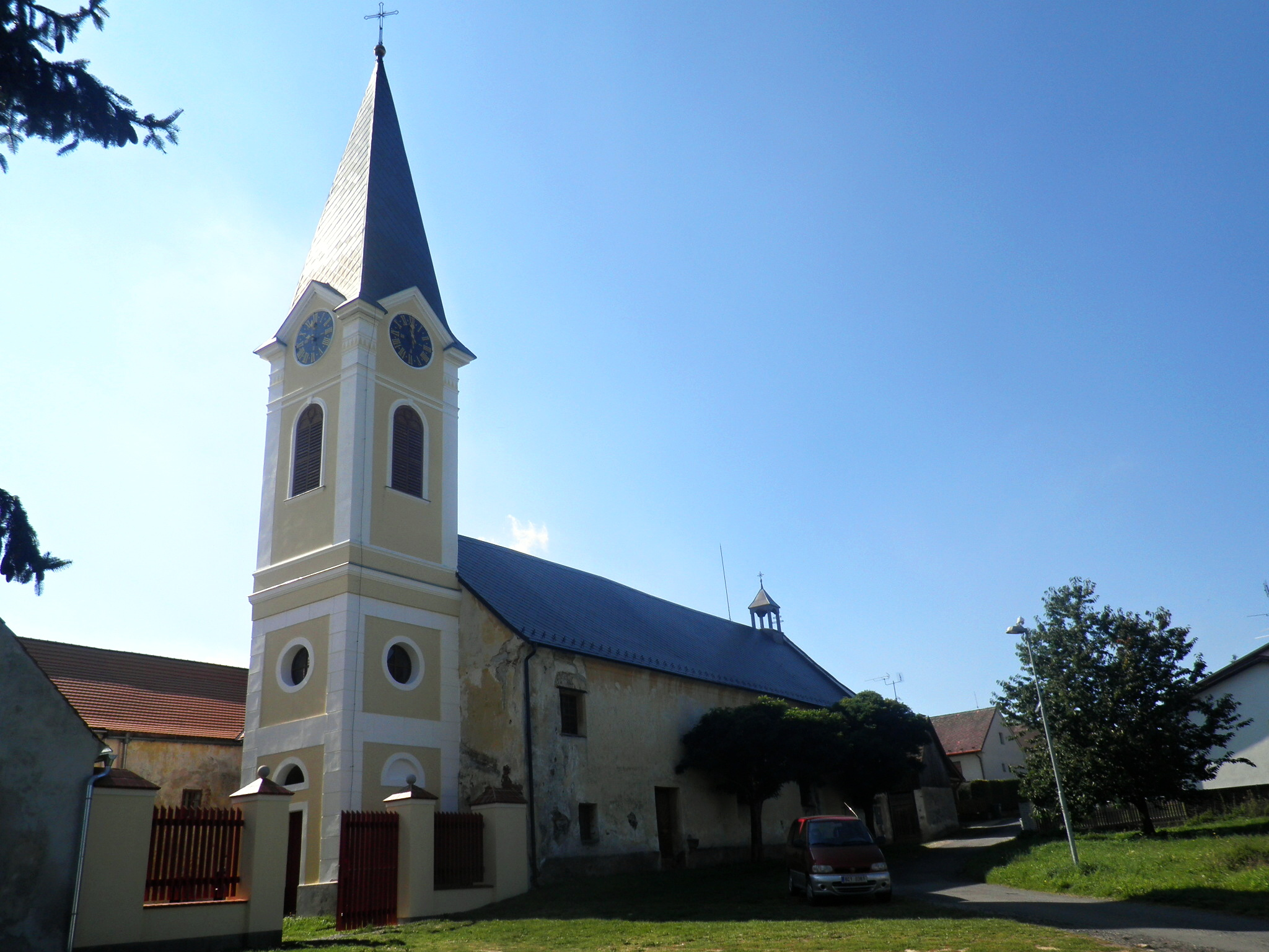 Kostel sv. Václava (Olešnice), Olešnice